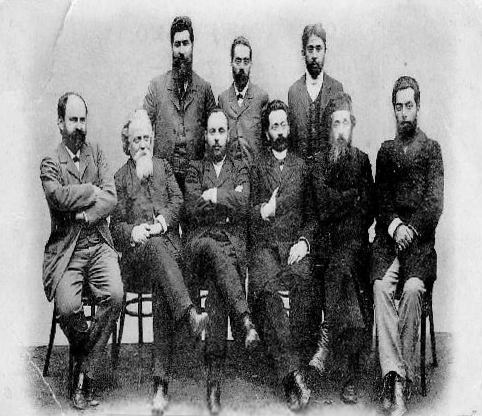 מנהיגי הציונות ברוסיה , הנהלת ההסתדרות הציונית ברוסיה ( ת. מ. 1900) מימין לשמאל: בלקובסקי, רבינוביץ , צ' לינוב, אוסישקין, יסינובסקי, י. ל. גולדברג, שורה שניה: ברוק , רוזנבוים, טיומקין.